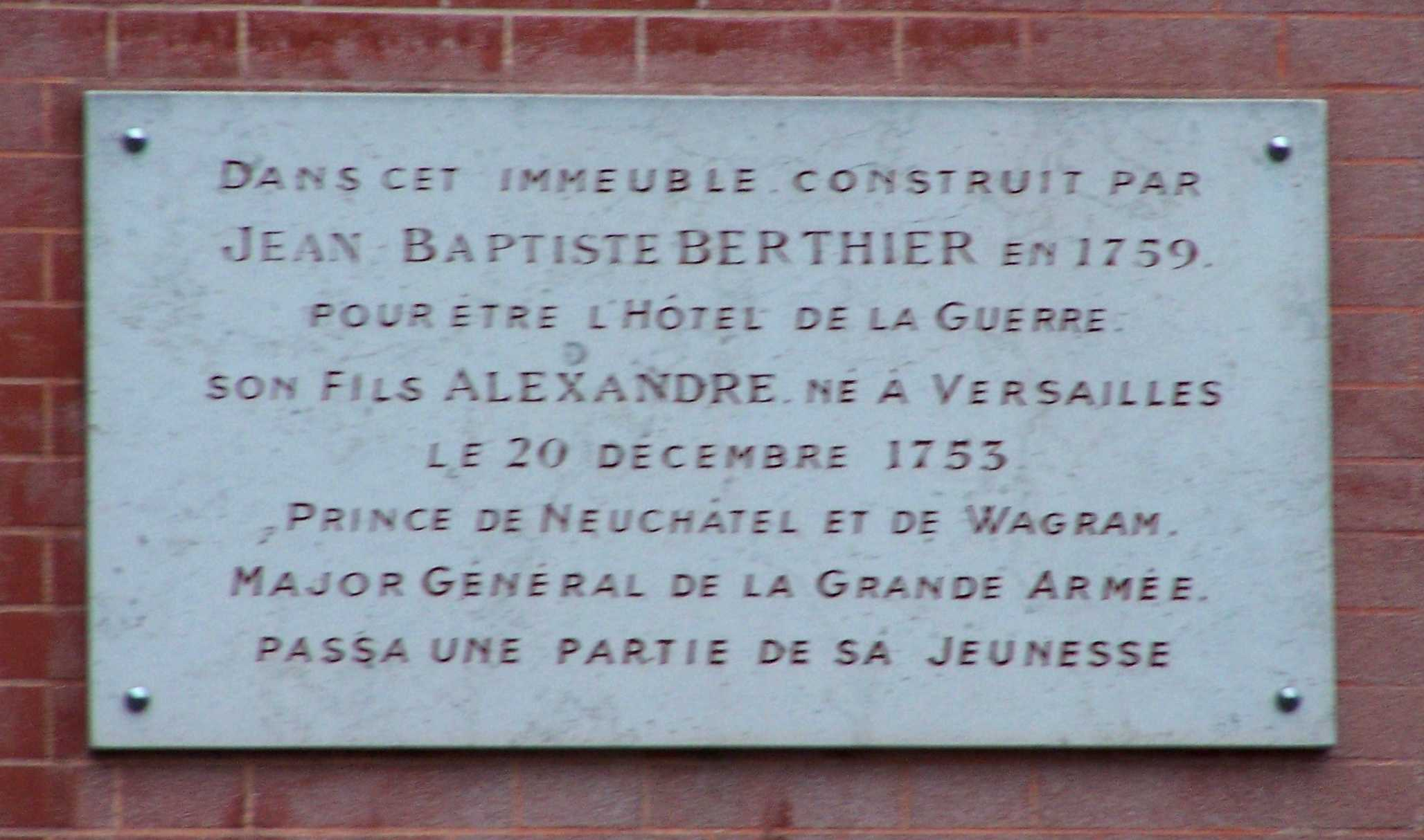 Plaque commémorative de la présence du maréchal Berthier apposée sur le ministère de la Marine, rue de l'Indépendance Américaine à Versailles (Yvelines, France)